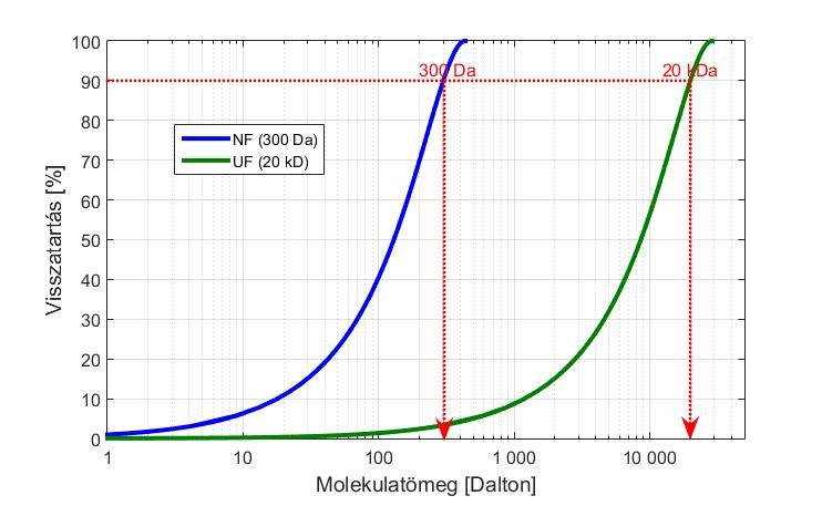 A visszatartás jellemző lefutása a molekulatömeg függvényében egy tipikus, 300 Dalton vágási értékű nanoszűrő (NF) és egy tipikus, 20 kDa vágási értékű ultraszűrő (UF) membrán esetében. Az ábra a [Kovács and Samhaber, Membrántechnika 12 (2), 22-36] cikkben publikált módszer alapján készült.